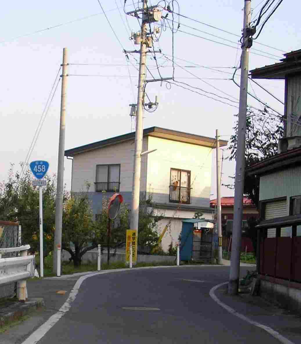 国道458号、山形県中山町内で南方向きに撮影。すれ違いは停止しないと困難。県道・町道よりも狭く、集落の中で目印もなしに屈曲したルートが、南隣の山辺町まで続く。2006年11月